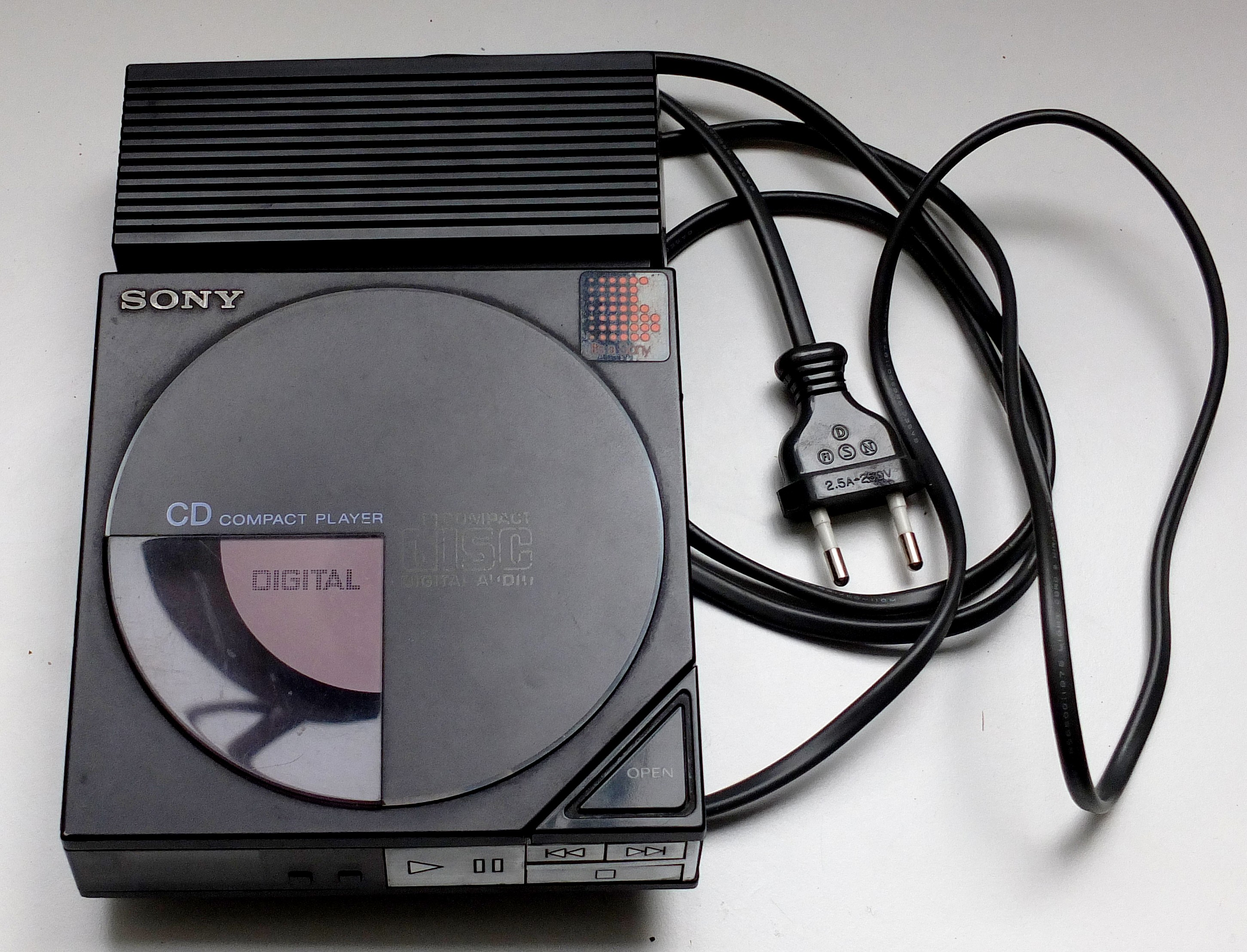 Le lecteur portable de CD de Sony D-50 Discman, commercialisé à partir de 1984. Le lecteur (12,7 x 12,7 cm) est ici connecté à son chargeur secteur.